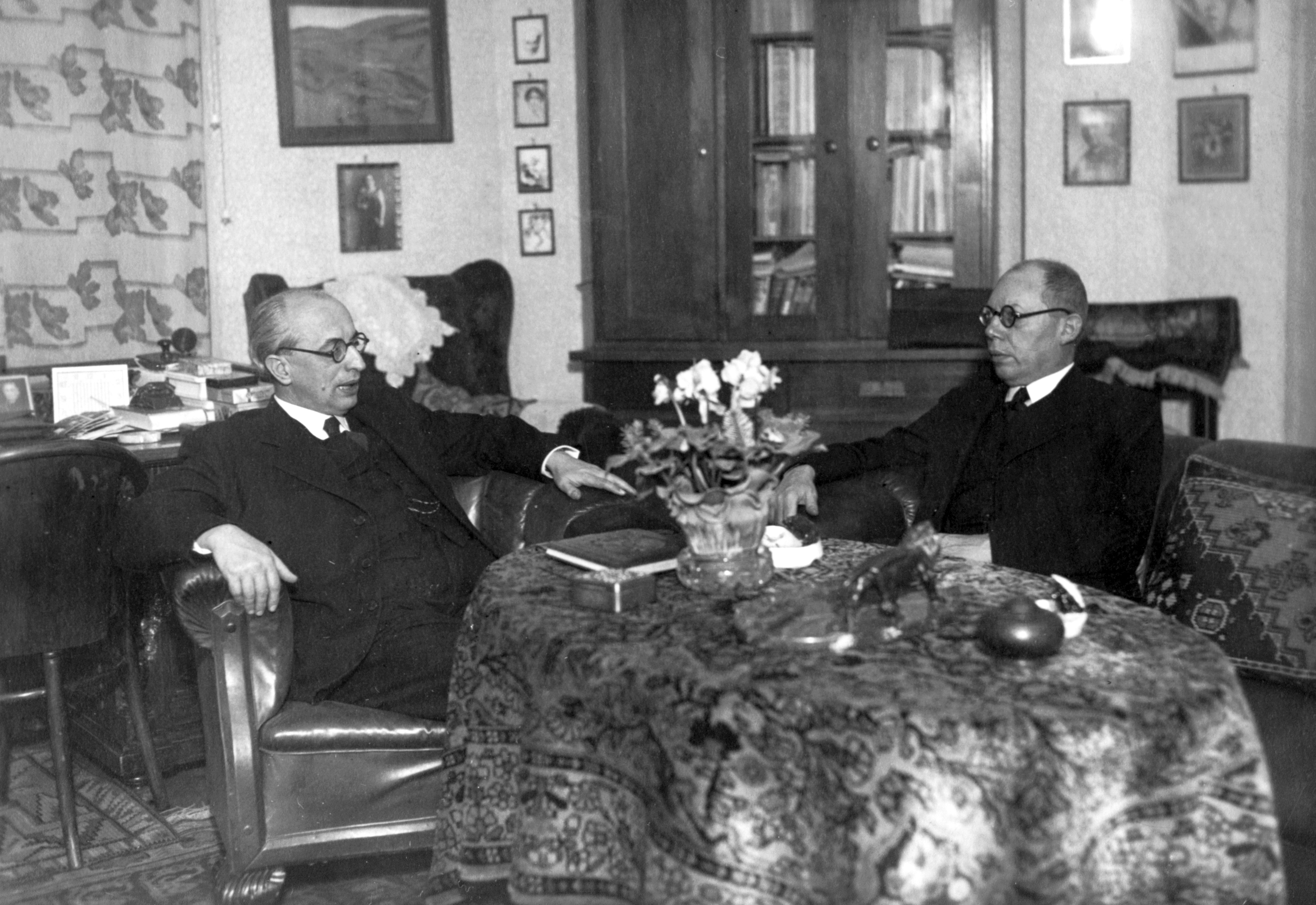 Ravasz László és Makkai Sándor református püspökök. Location: Hungary Tags: religion, church, bishop Title: Ravasz László és Makkai Sándor református püspökök.